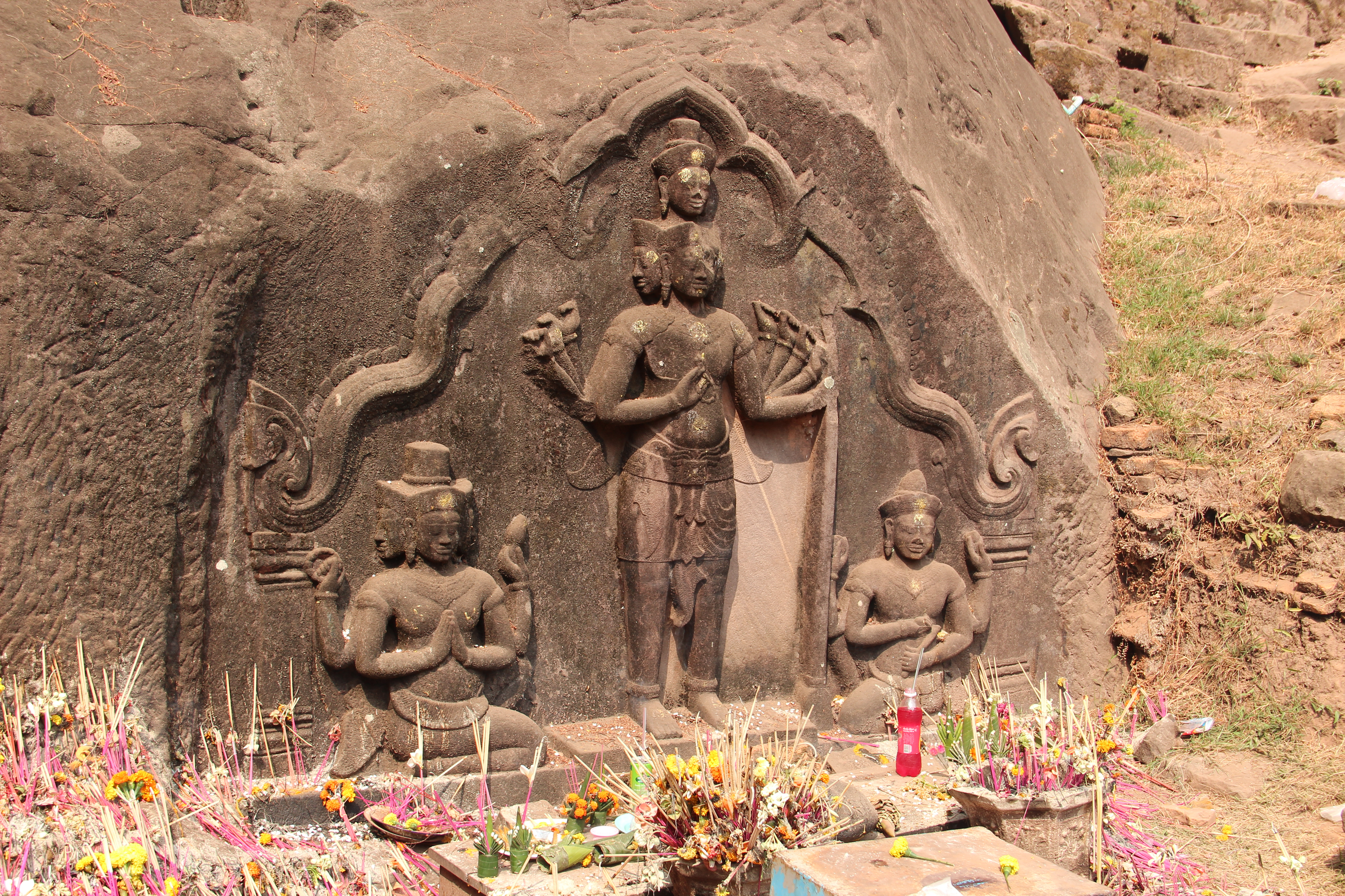 Trimurti, Wat Phou Champasak (Laos).